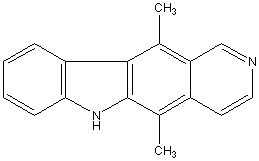 椭圆玫瑰树碱的结构式 用CS ChemDraw制作